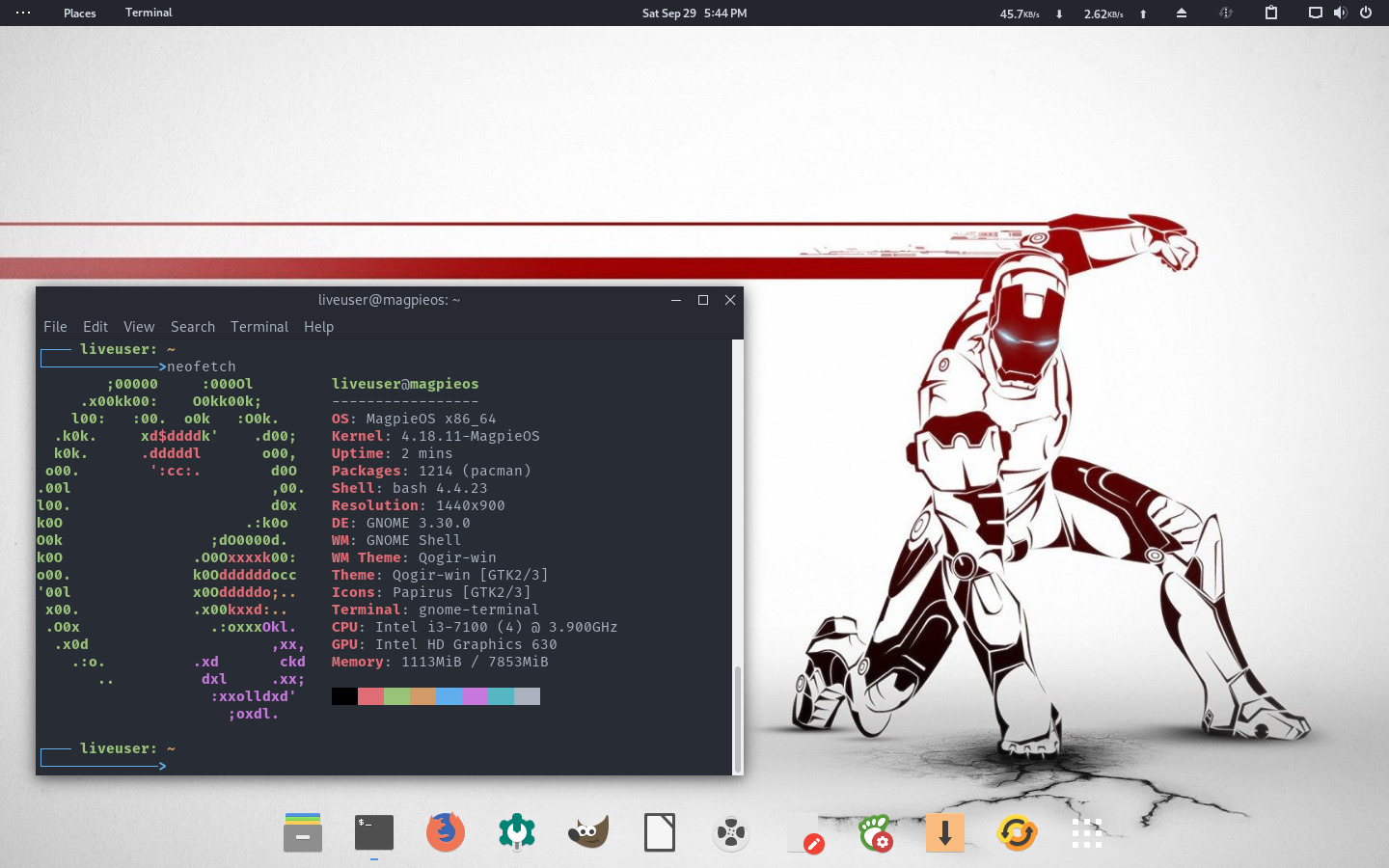 Screenshot of MagpieOS Gnome